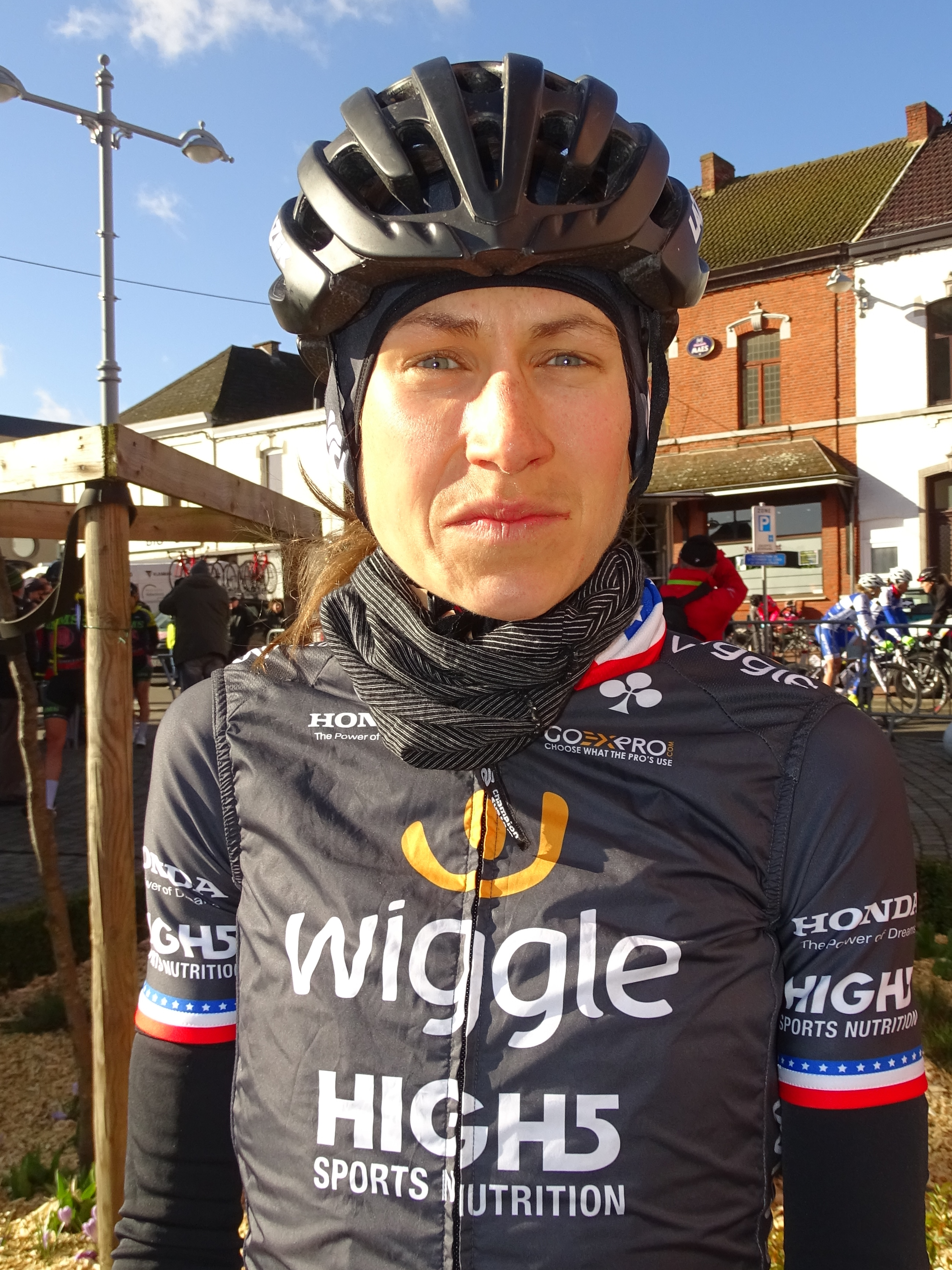 Reportage réalisé le mercredi 2 mars à l'occasion du départ du Samyn des Dames 2016 et du Samyn 2016 à Quaregnon, Belgique.